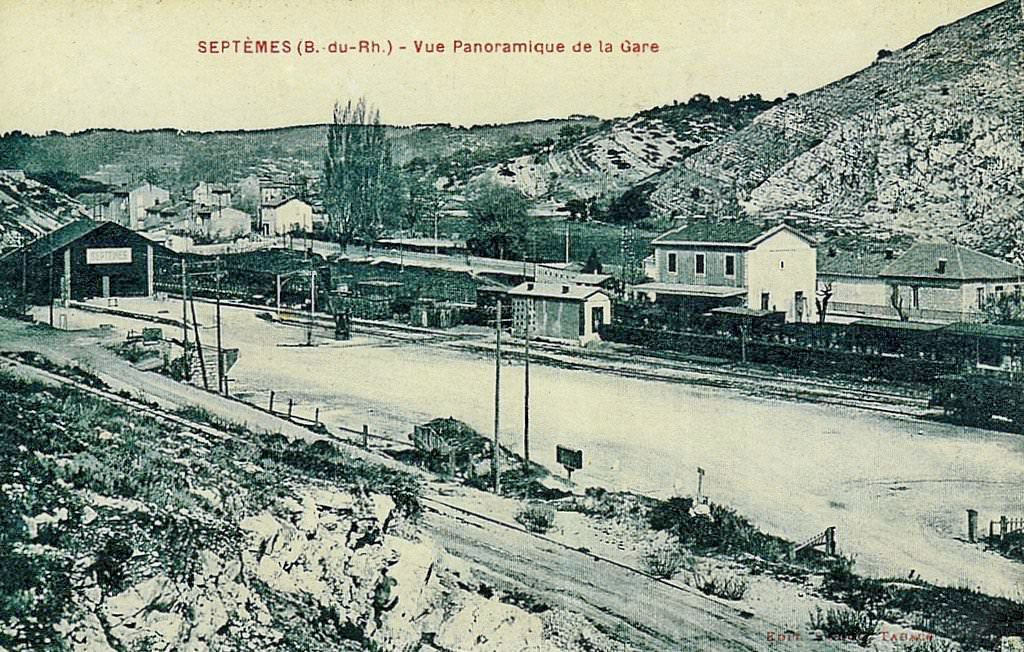 Vue panoramique de la gare PLM de Septèmes vers 1900.